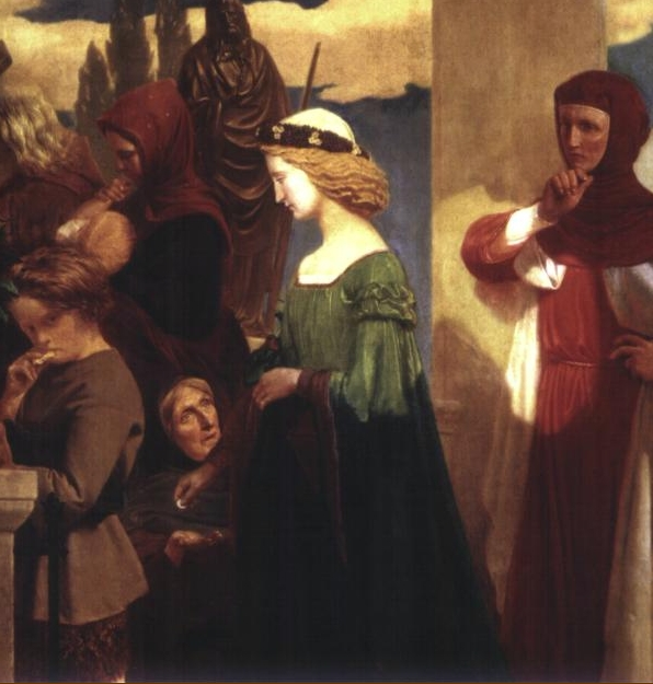 Laura